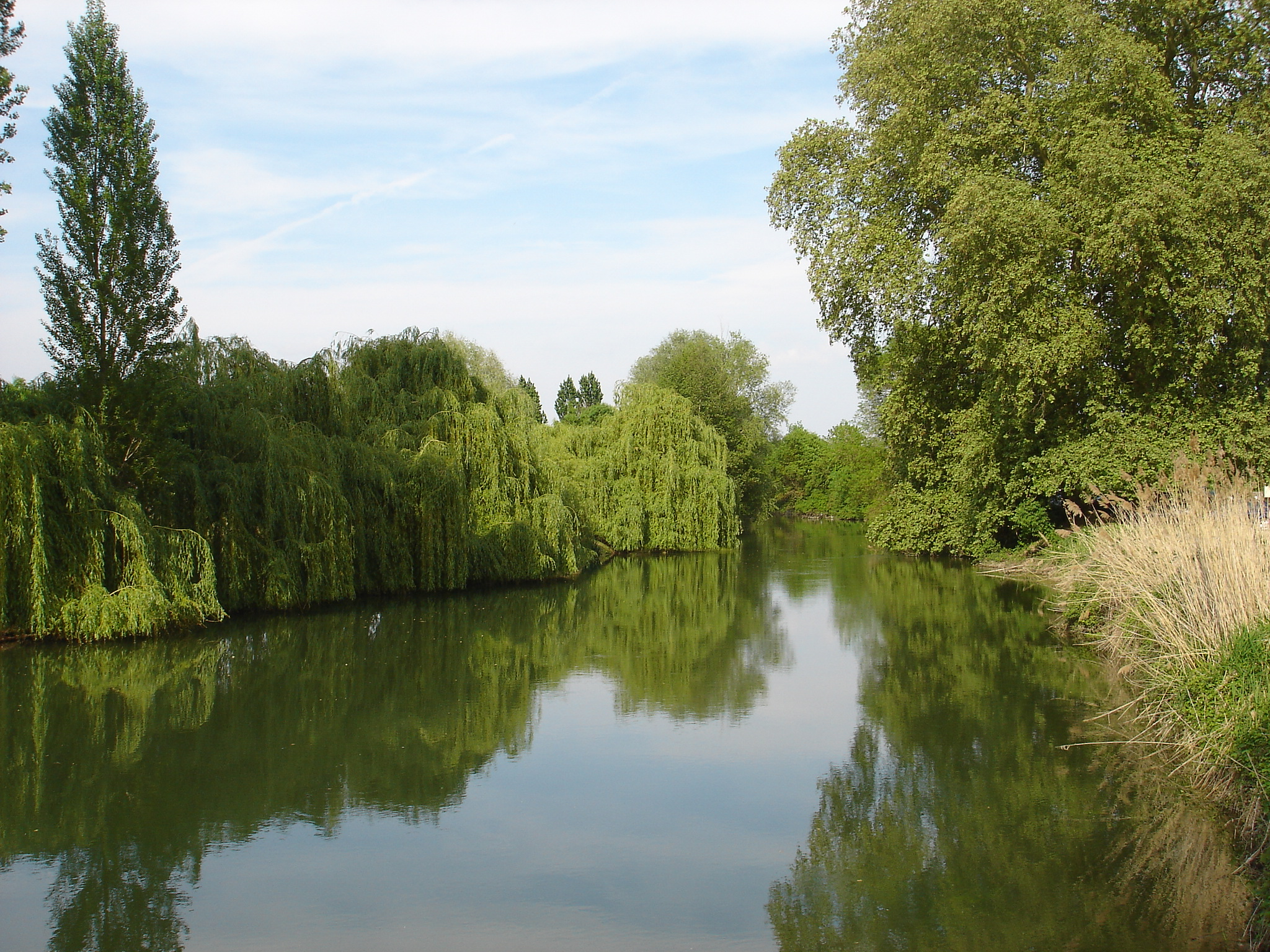 L'Indre à Rigny-Ussé (devant le château d'Ussé); Saule pleureurs et peuplier d'Italie.